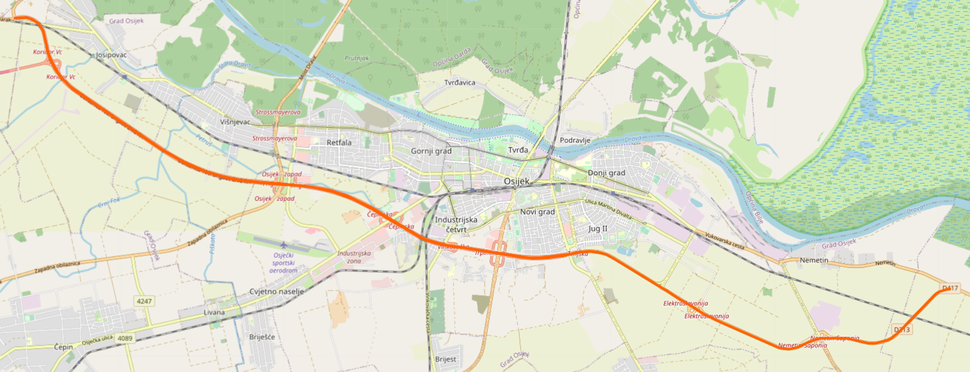 Osječka južna obilaznica